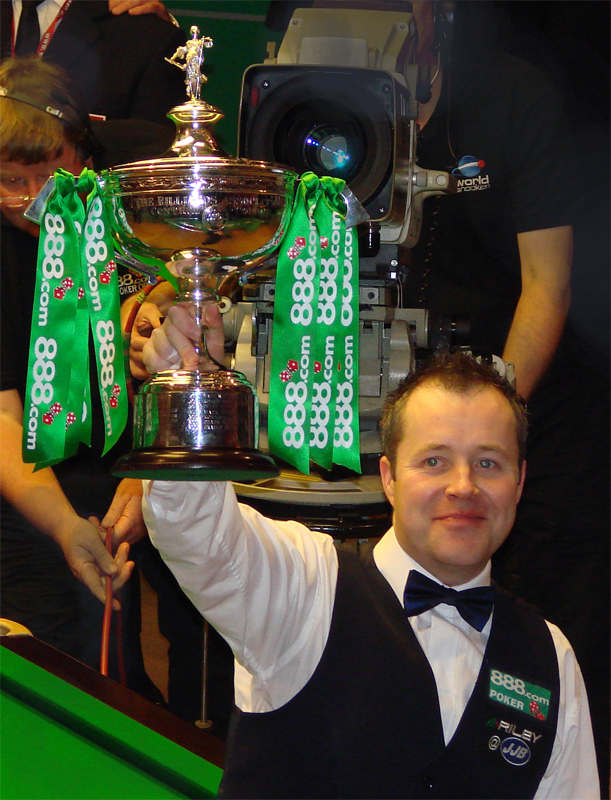 Ben Woodward